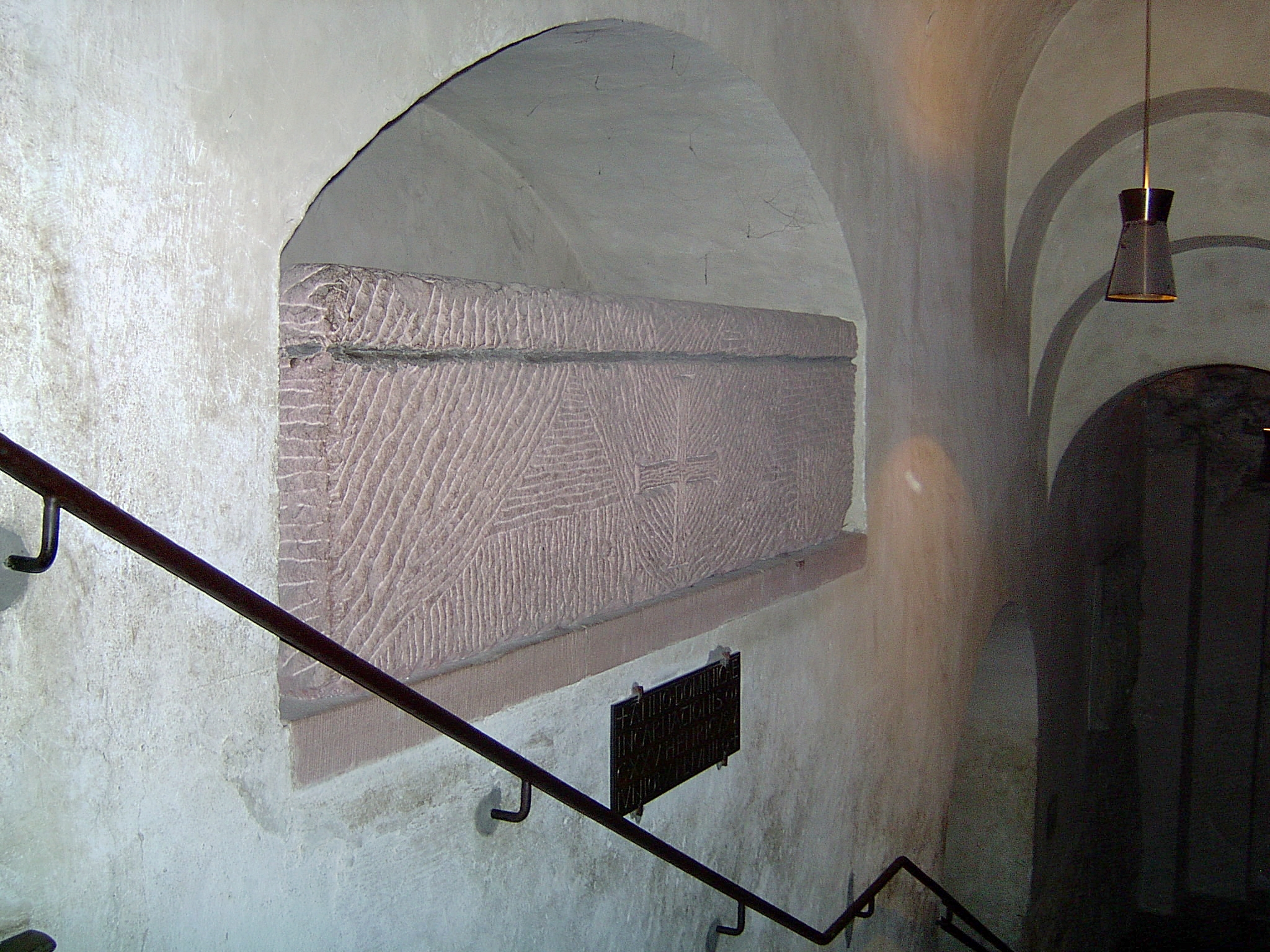 Grablege Heinrich V. in der Krypta des Speyerer Dom